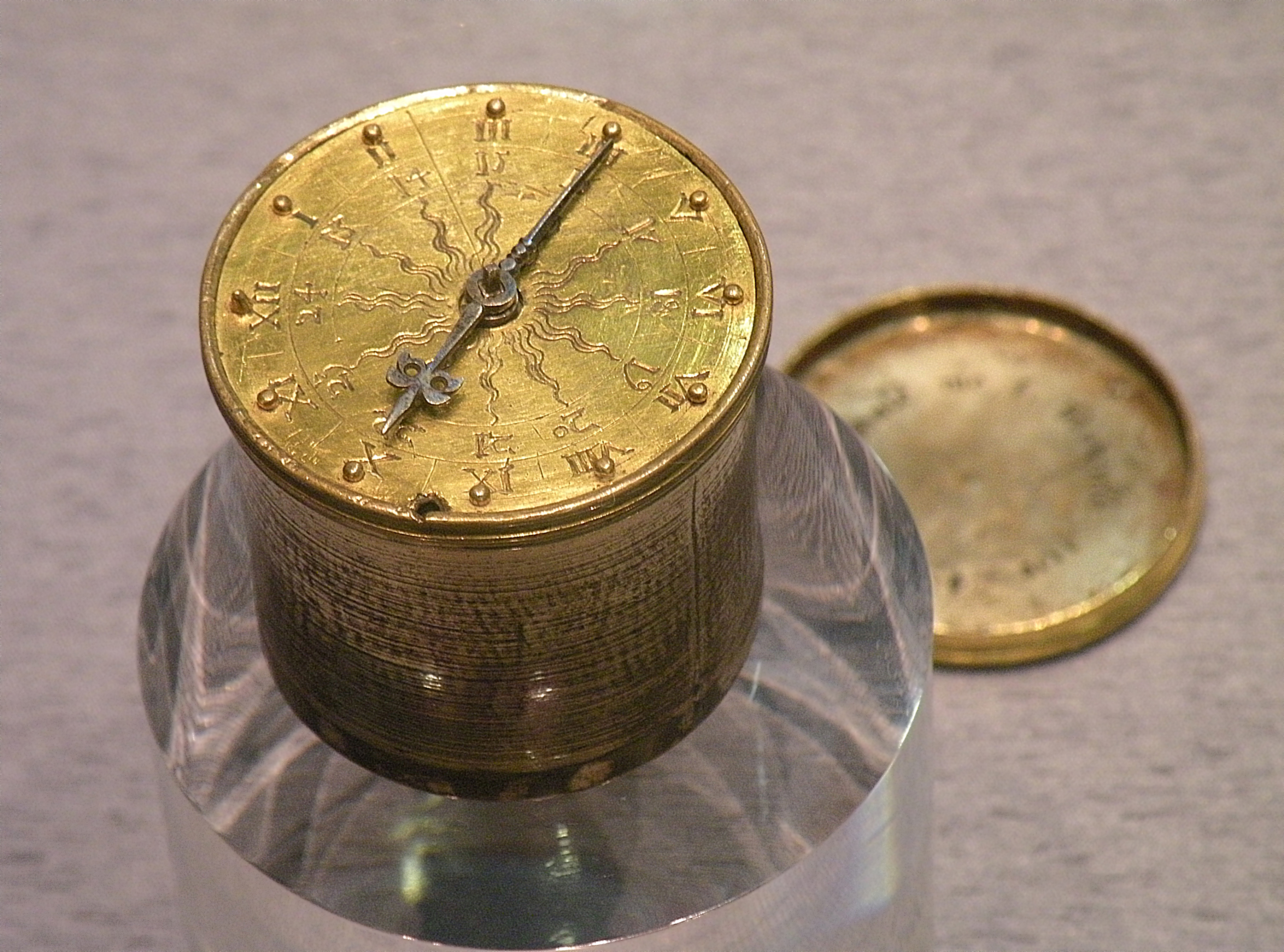 Карманные_часы_Хенляйна